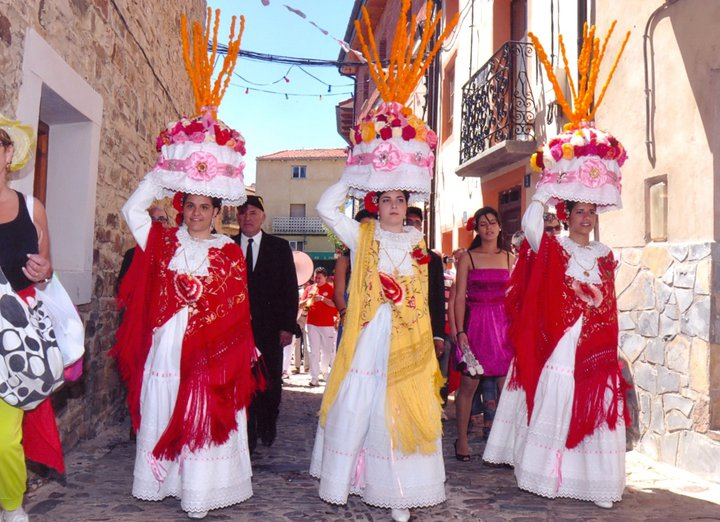 MONDIDAS DE SAN PEDRO MANRIQUE (SORIA)